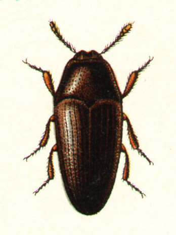 Throscus dermestoides